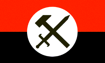 Прапор Української Націонал-трудової партії. Згiдно офiцiйному опису: "Червоний, чорний і білий кольори є традиційними для українського народу. ... перехрещені меч і молот символізують боротьбу і труд (